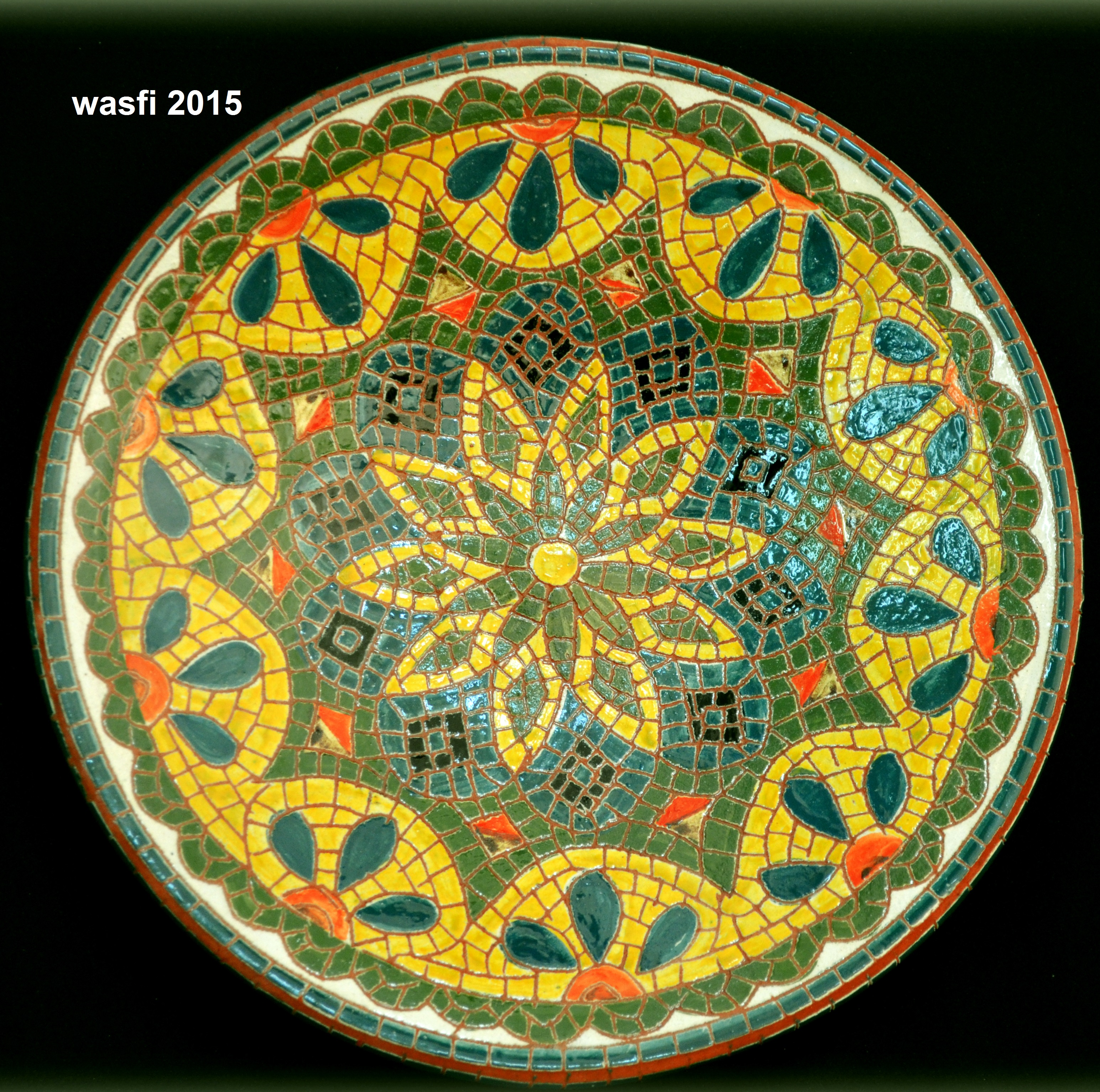 خزف